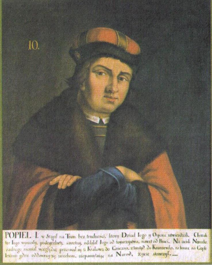 Popiel I